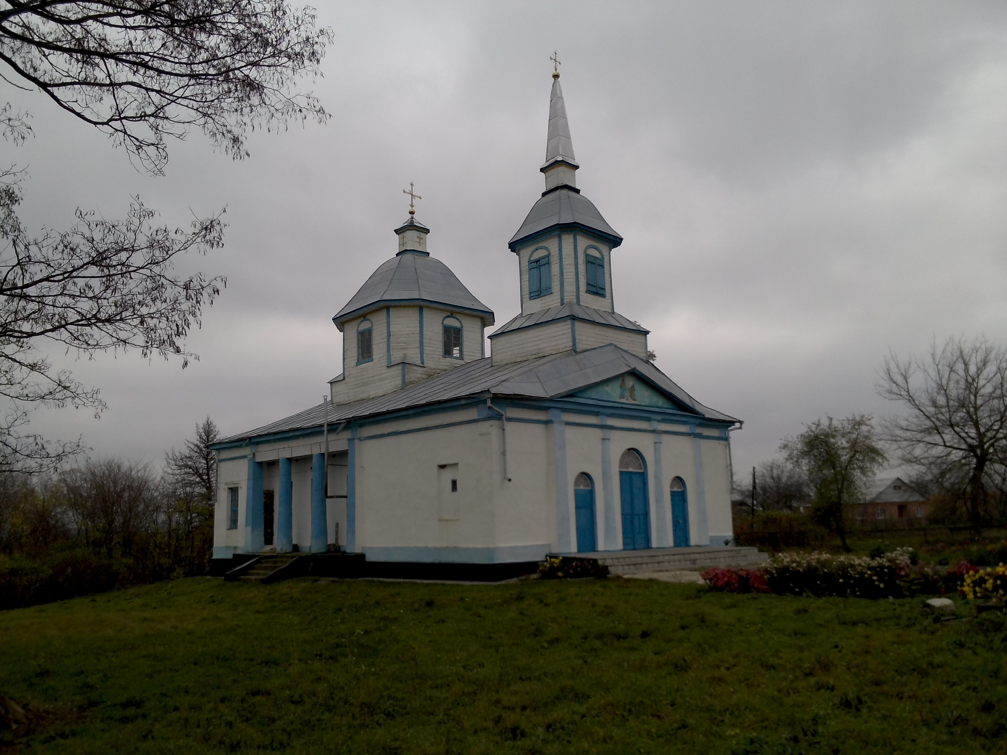 с. Нова Прилука. Церква